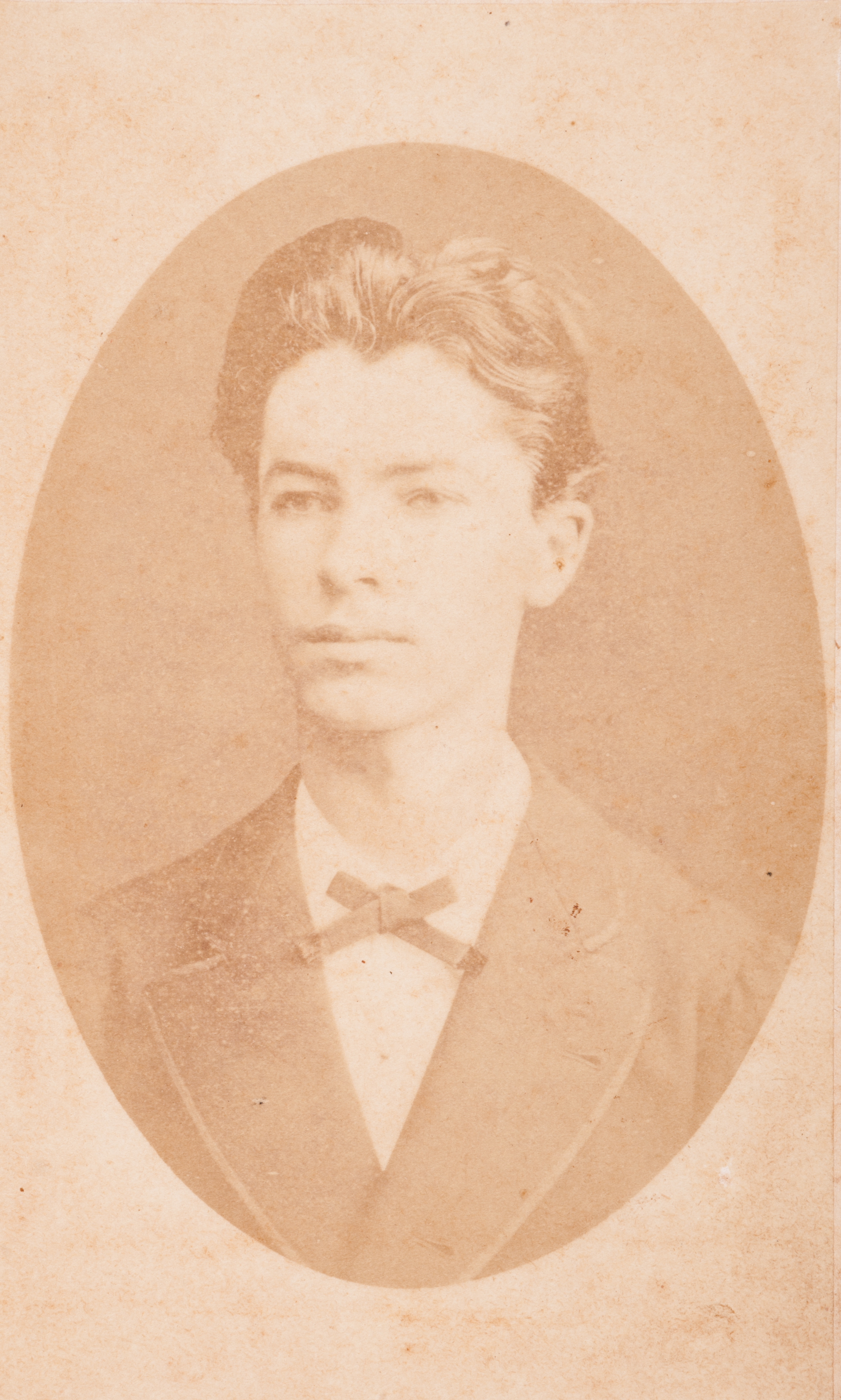 Obra que integra o acervo do Museu Paulista da USP. Coleção Carlos Eugênio Marcondes de Moura